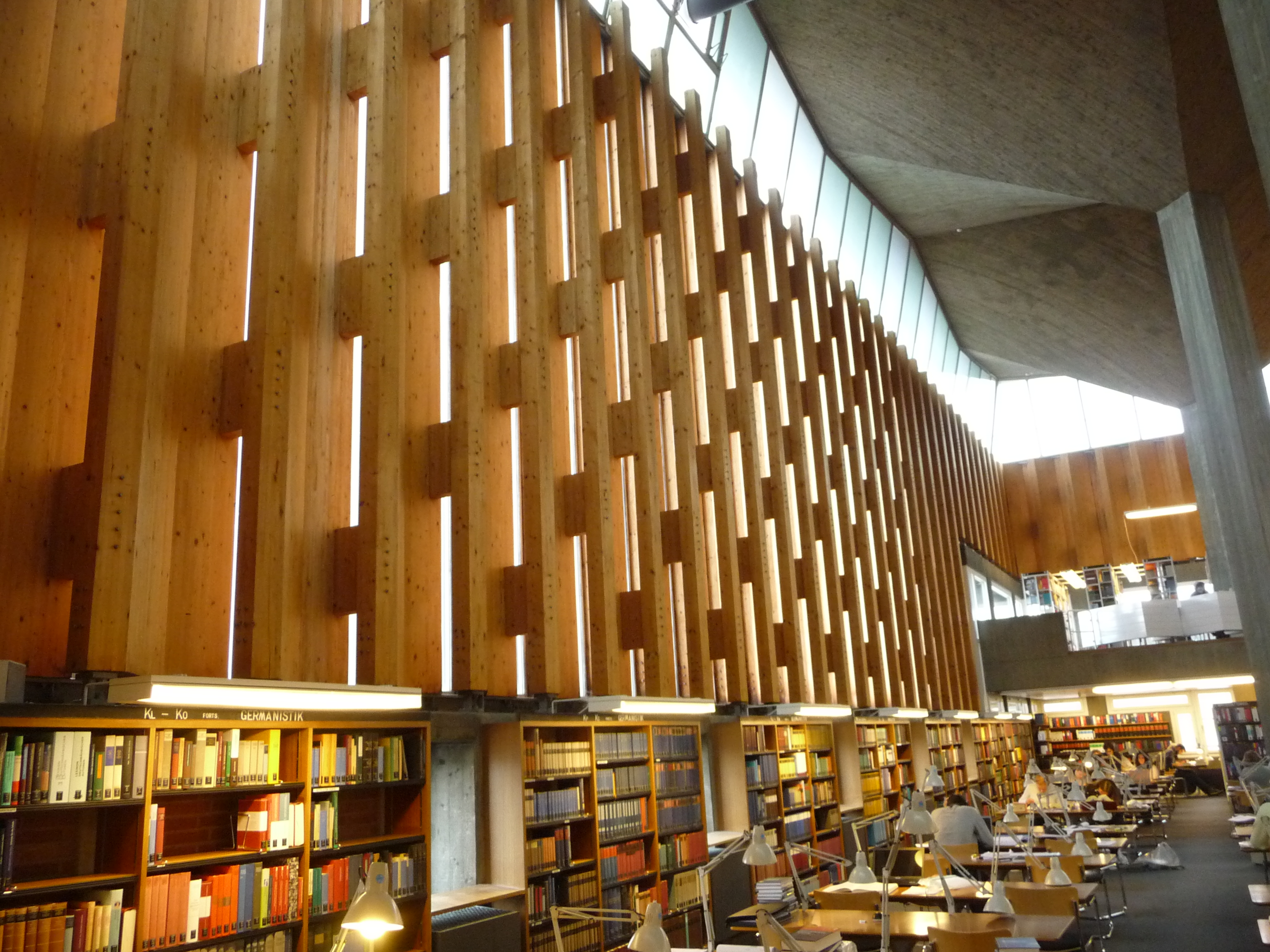 Württembergische Landesbibliothek